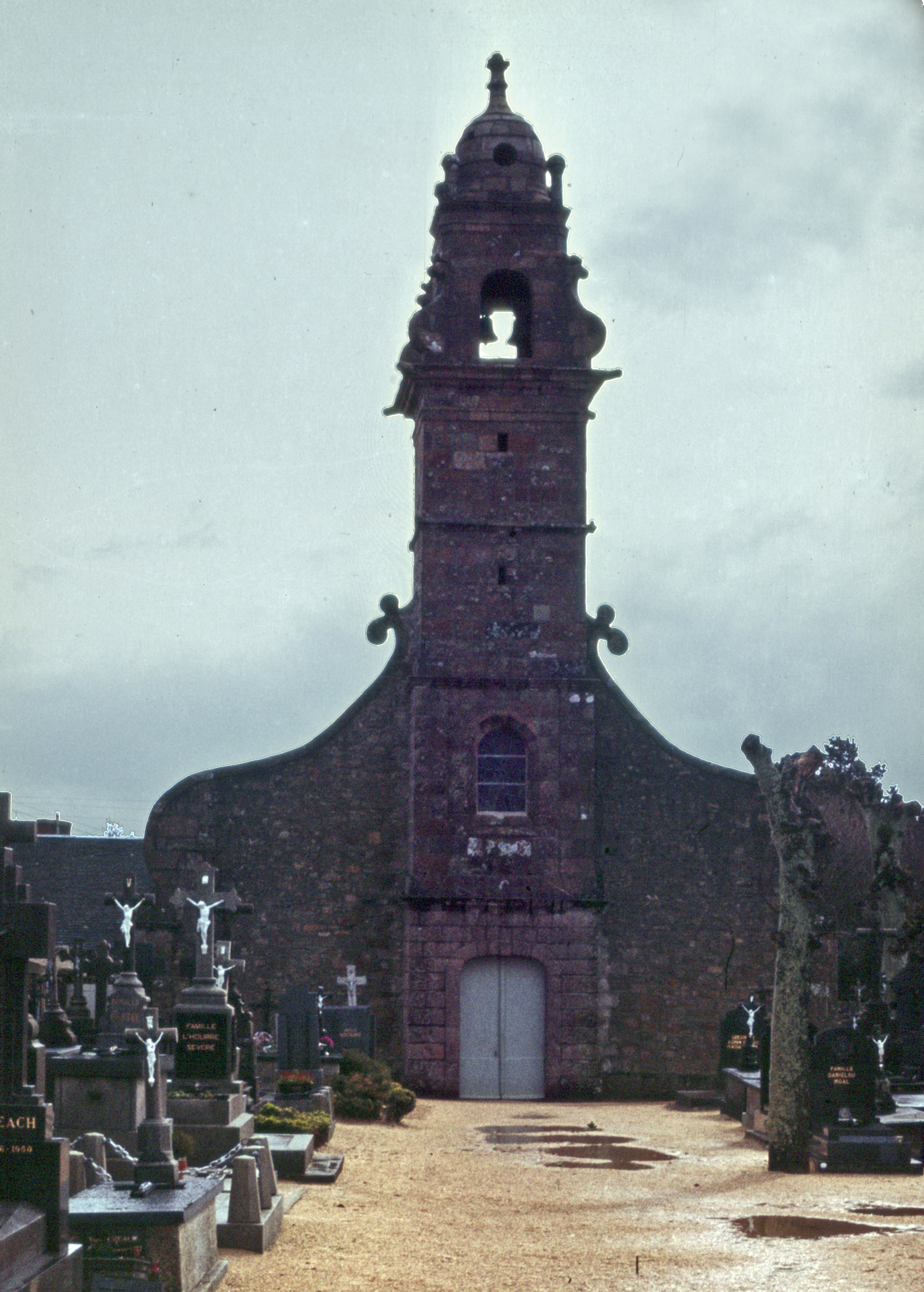 Saint-Pol-de-Léon